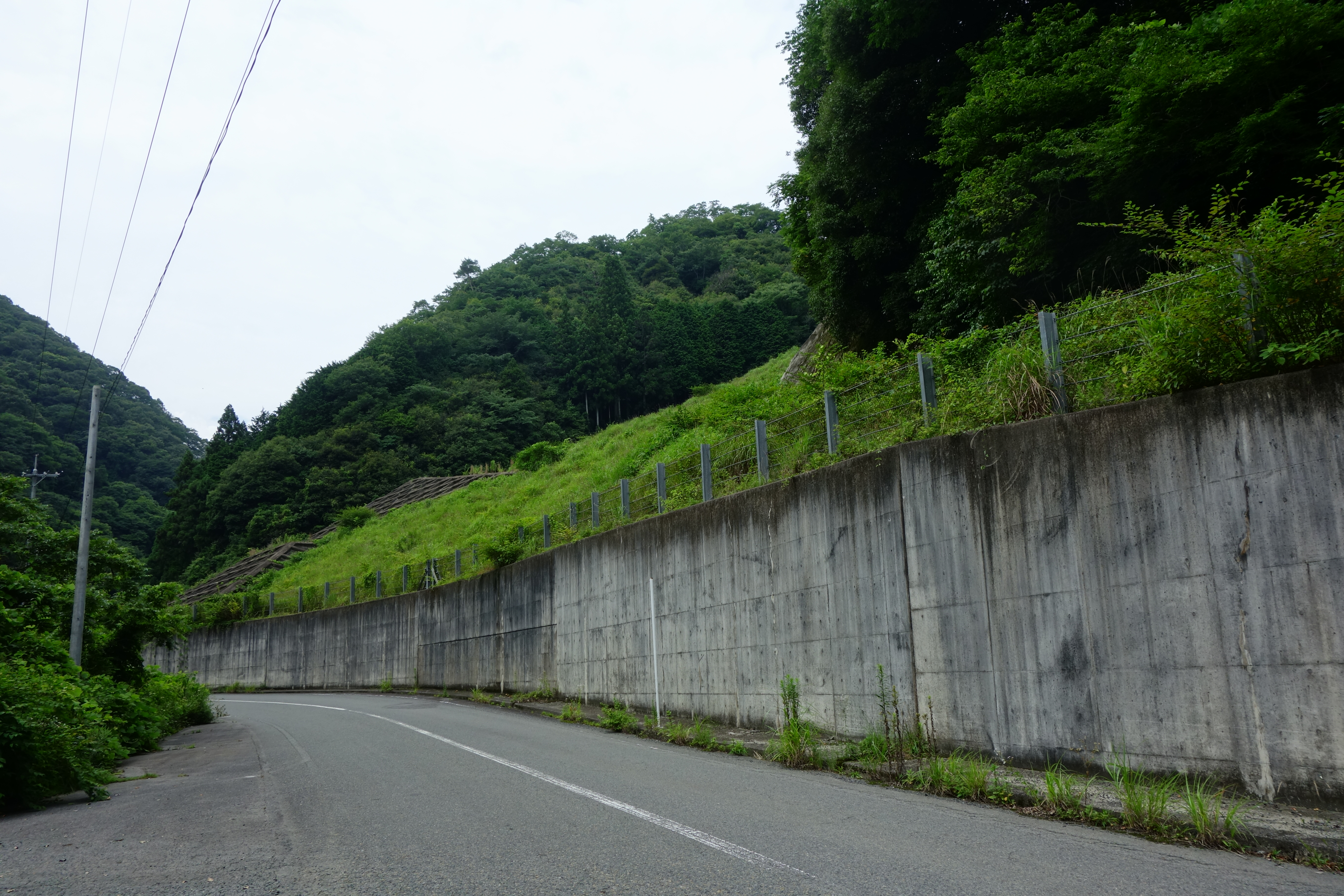 広島県府中市の出口川湧水処理場。コンクリートで被覆された採石場。下部の一部が見えているだけ。下の道路は県道388号線。山頂までコンクリートは階段状に続いている。